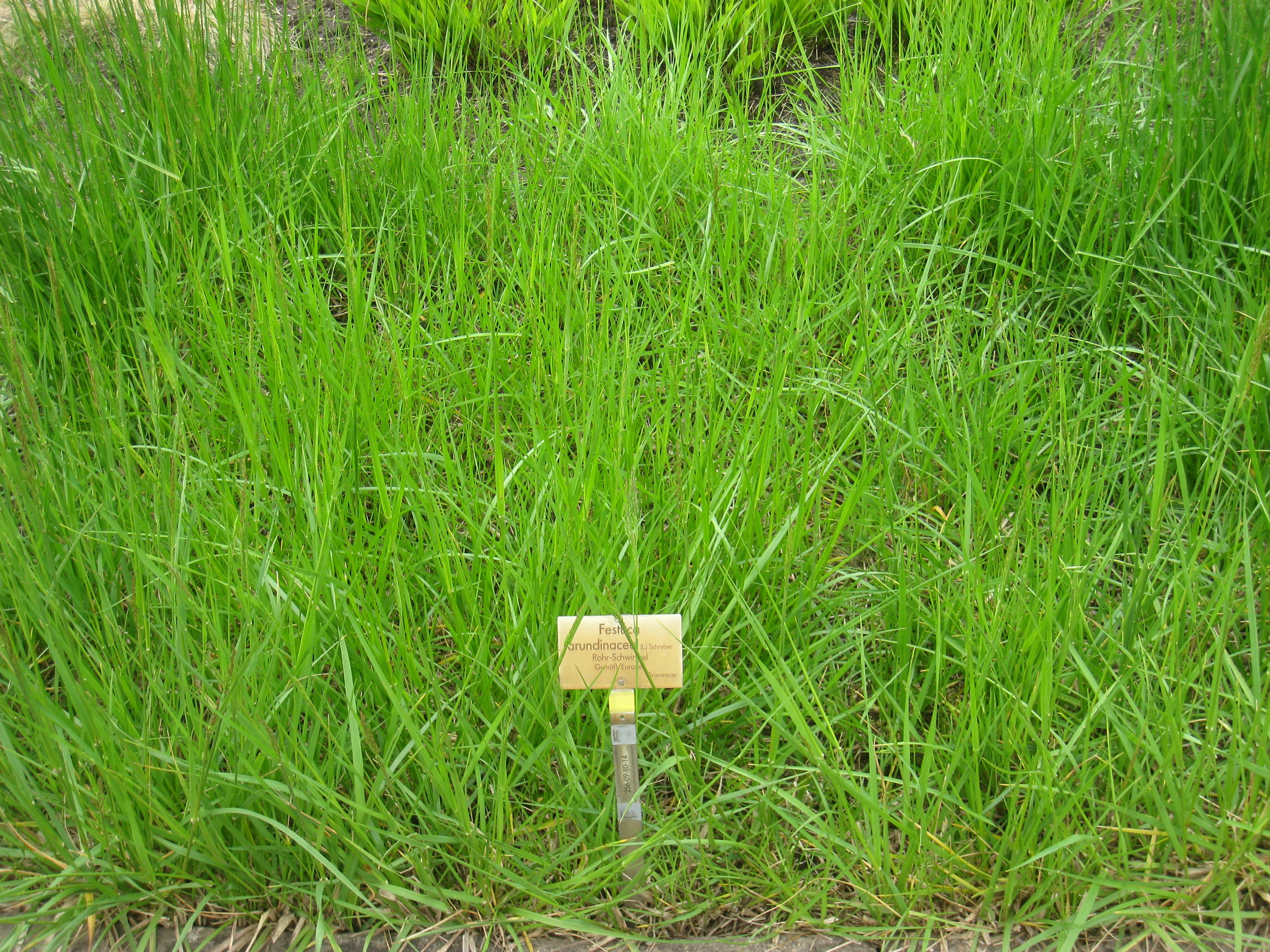 Festuca arundinacea specimen in the Botanischer Garten, Berlin-Dahlem (Berlin Botanical Garden), Berlin, Germany.